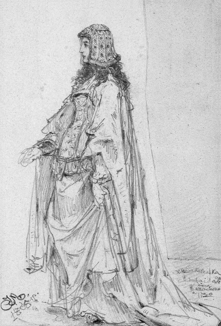 Adelajda Heska, żona Kazimierza Wielkiego